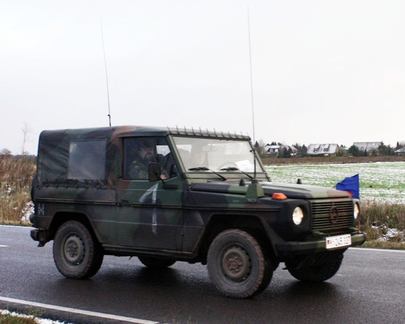 Mercedes Benz Wolf, 250GD in der Variante Funkführungsfahrzeug während einer Verlegeübung der Panzerbrigade 12. Diese Fahrzeuge dienen den Kompaniechefs und Battailonskomandeure als Führungsfahrzeug.